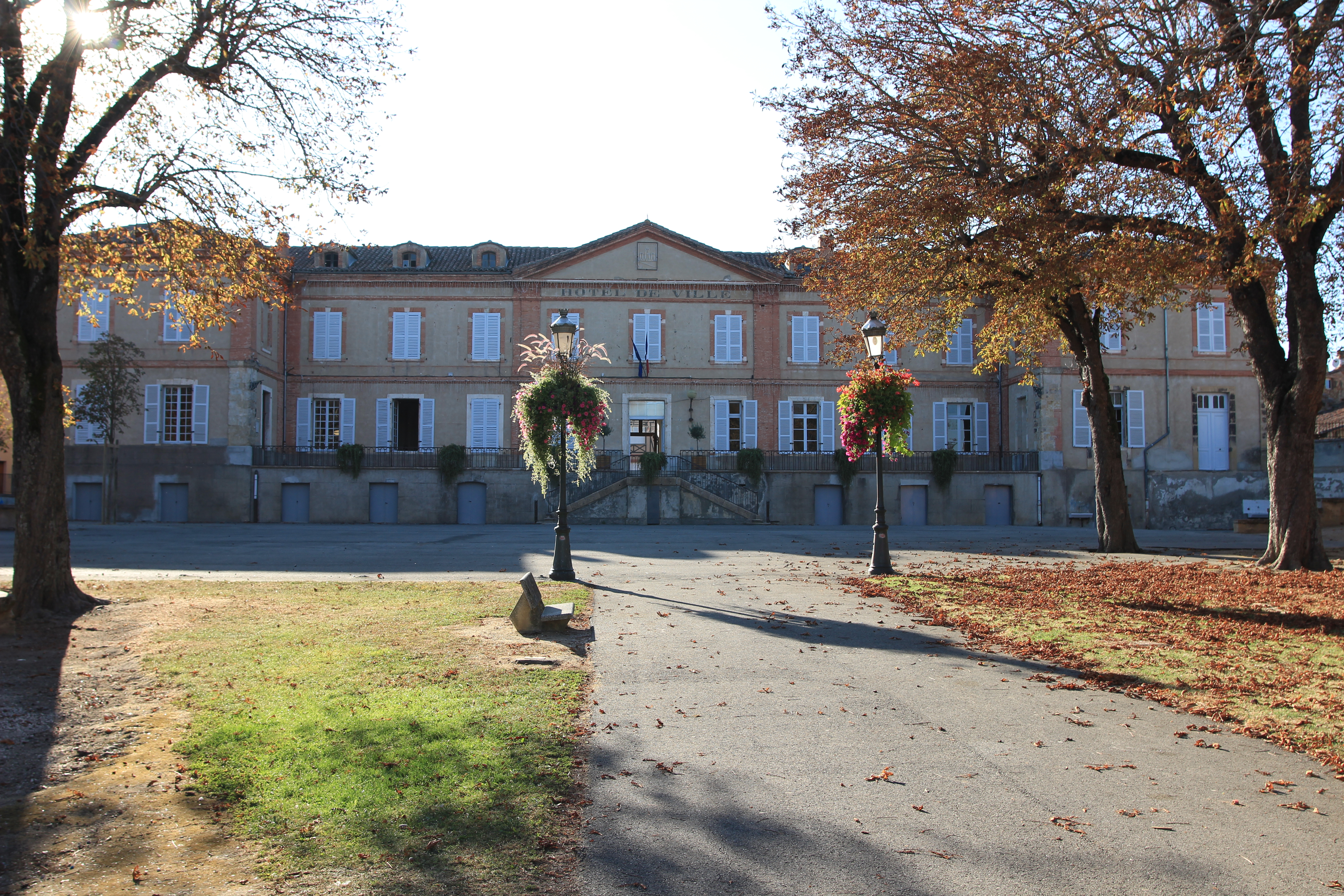 Hôtel de ville de Lézat-sur-Lèze (Ariège, France).